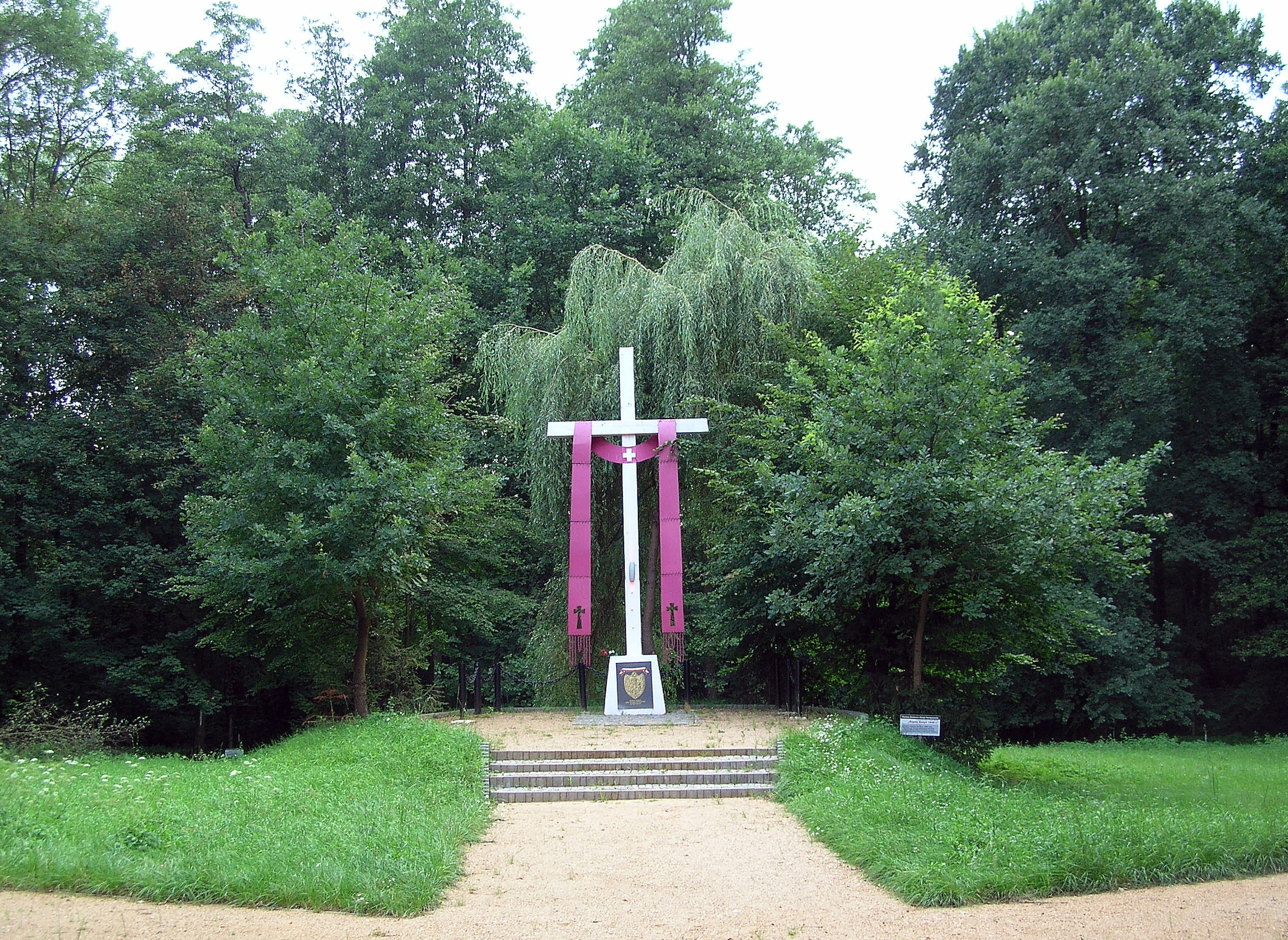 Pomnik pomordowanych przez UB partyzantów NSZ we wsi Barut.